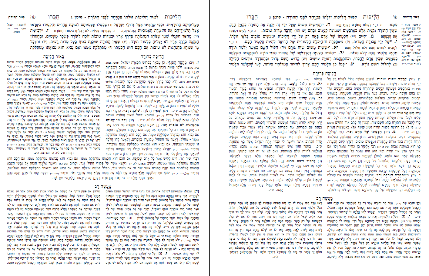 הספרים ערוכים בצורת המשנה ברורה המנוקד הכוללים הליכות, באר הליכה, הליכה ברורה, ביאור הליכה ומעשה רב